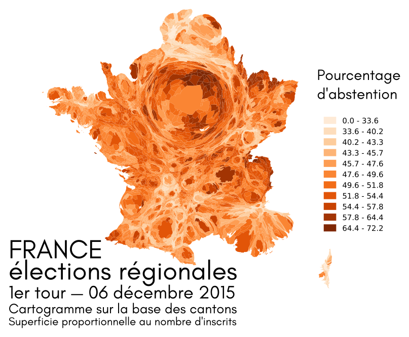 Cartogramme de l'abstention des élections régionales françaises. 1er tour — 06 décembre 2015. Cartogramme sur la base des cantons : superficie proportionnelle au nombre d'inscrits. Version vectorielle. Voir aussi File:Cartogramme abstention régionales 2015 tour 1 par canton.png